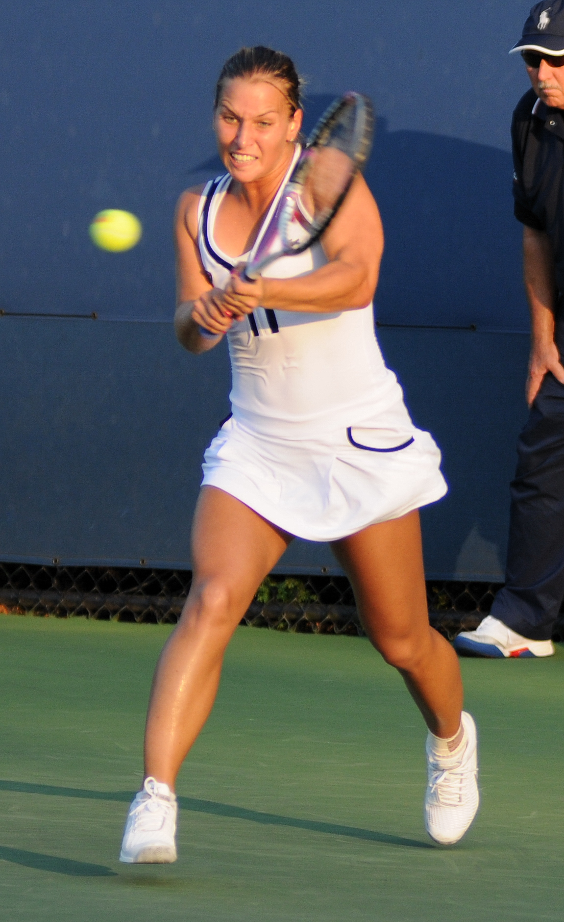 Dominika Cibulková - US Open 2010